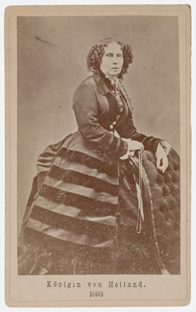 Foto van Koningin Sophie der Nederlanden, eerste echtgenote van koning Willem III.